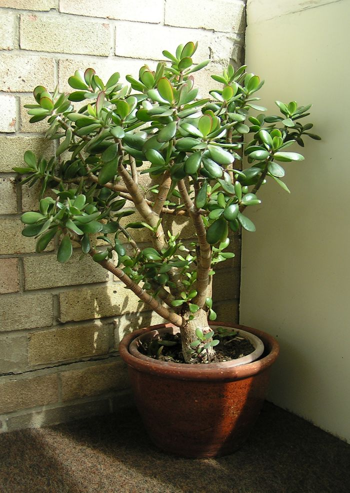 Crassula ovata, or "jade plant", "money tree", see Jade plant.